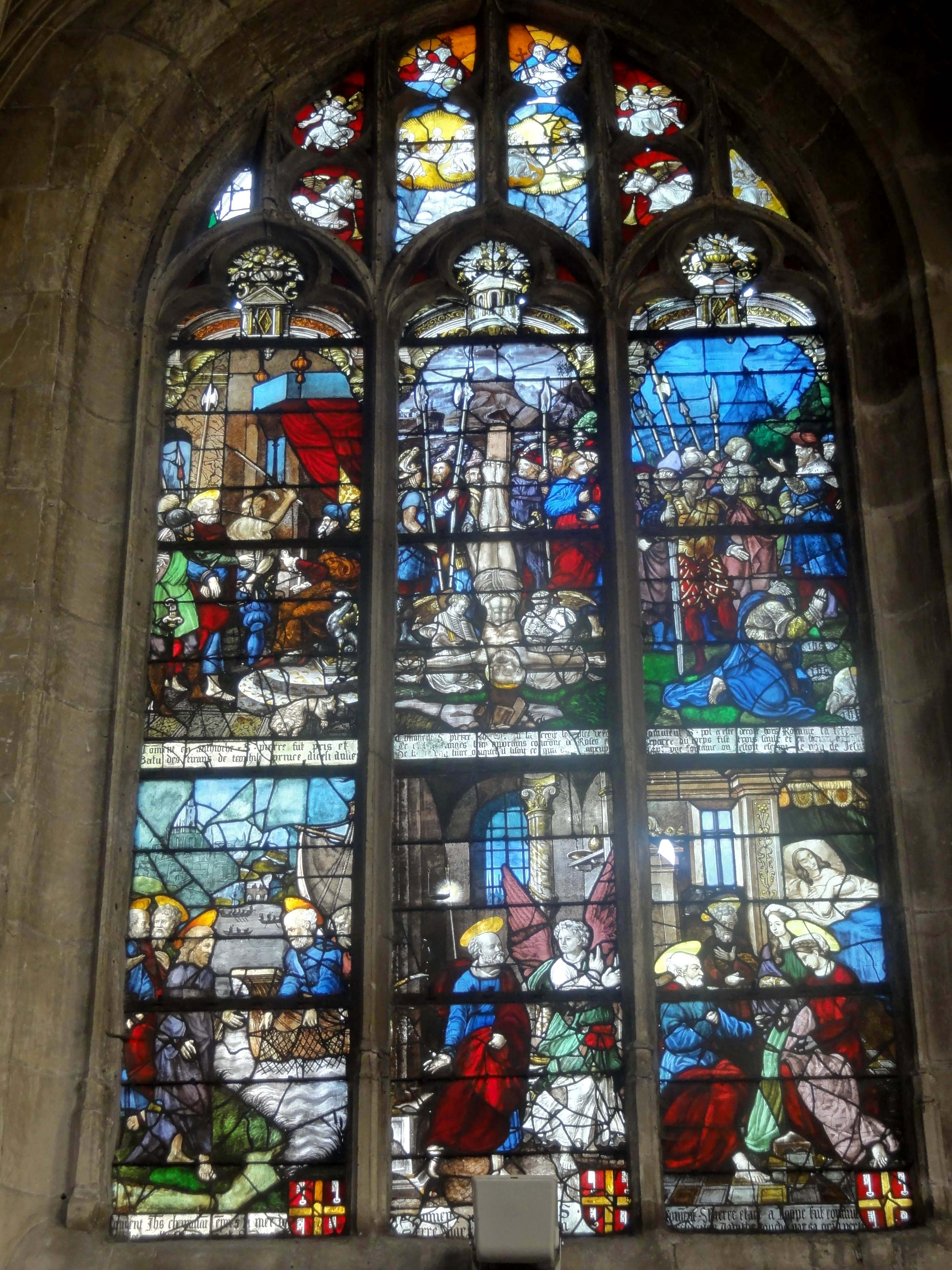 Verrière n° 3 - vie de saint Pierre et saint Paul.